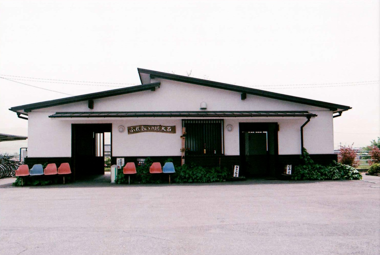 筑後大石駅（2011/05/02）